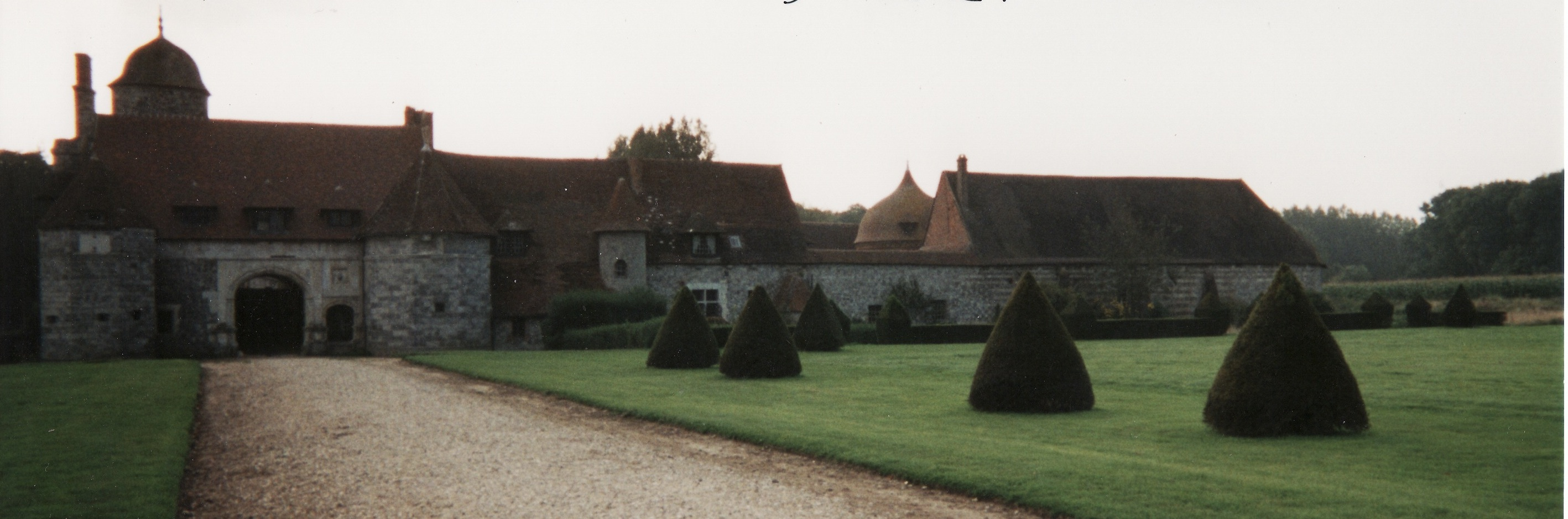 Porte d'entrée du Manoir d'Ango ( Varengeville-sur-Mer en Seine-Maritime, rég : Haute Normandie)